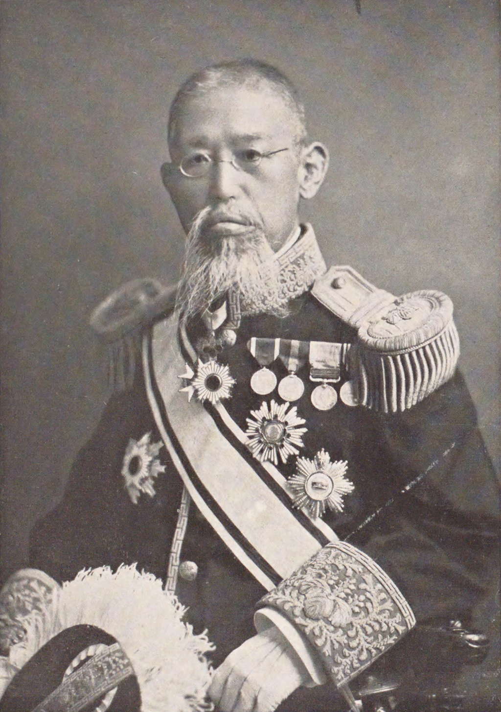 Shinji Tsuji